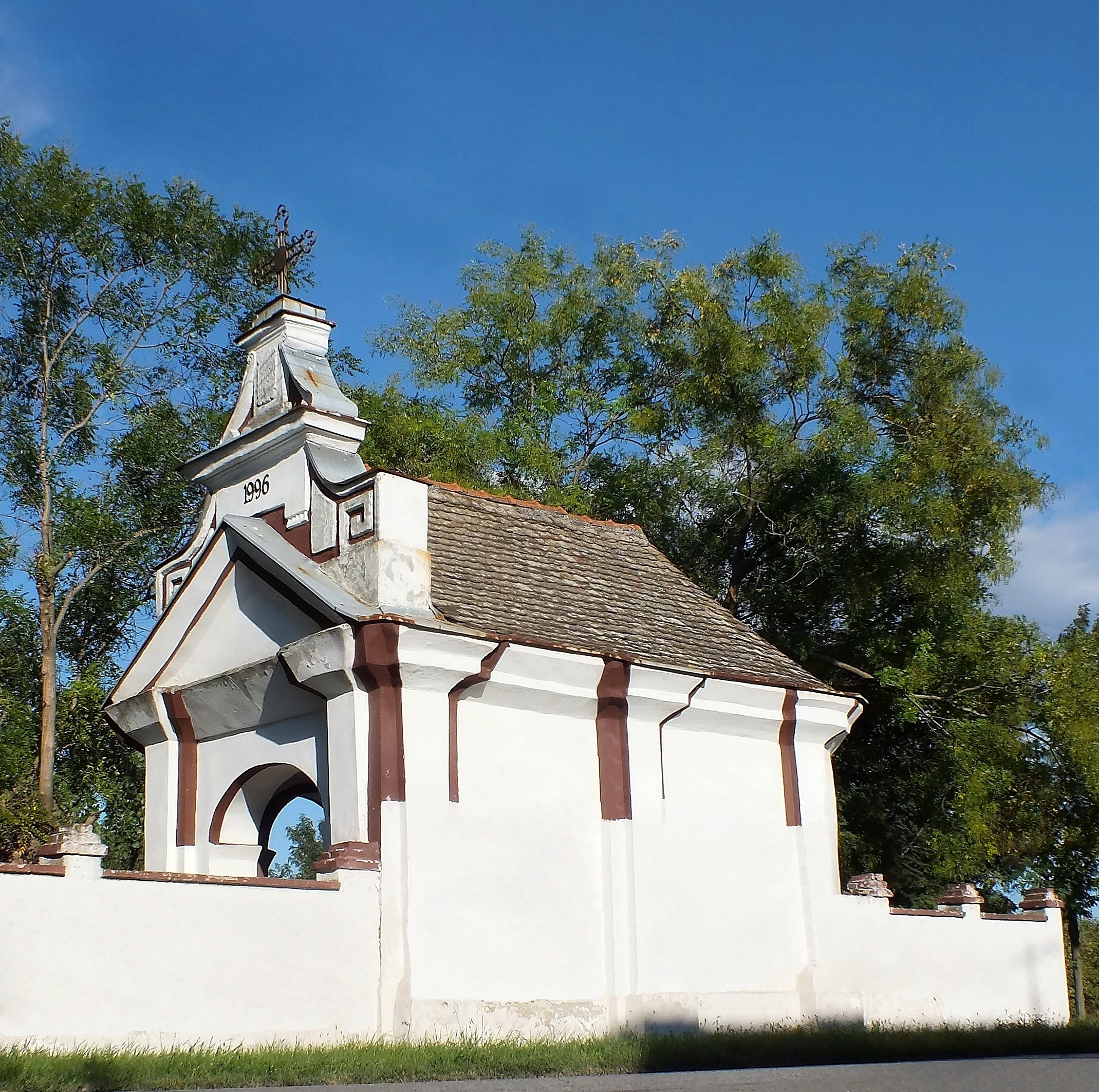 Капела "Водица" у Врбасу налази се на периферији града,поред самог пута за Бачко Добро Поље и Нови Сад...